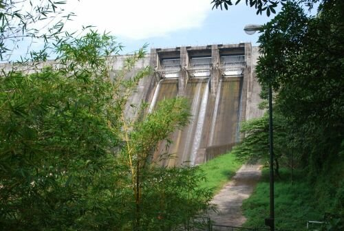 Thenmala dam